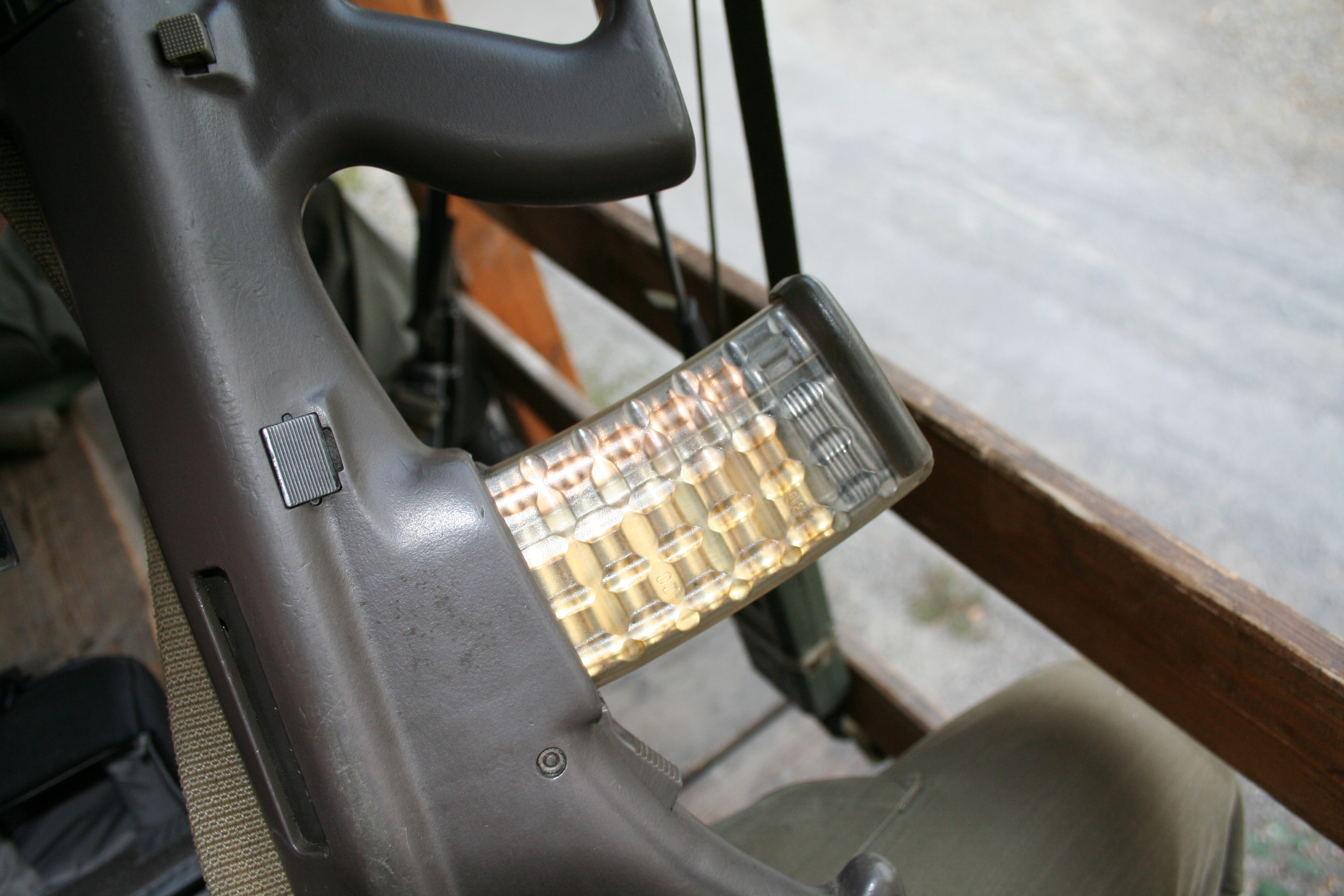 30 Schuss .223 Remington für STG77; Magazin zur Selbstverteidigung im AssE GRÜ